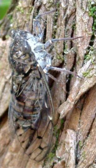 Eine Manna-Zikade (Cicada orni) auf einem Pinienstamm in Südfrankreich – Vielen Dank an Doc Taxon für die Bestimmung!